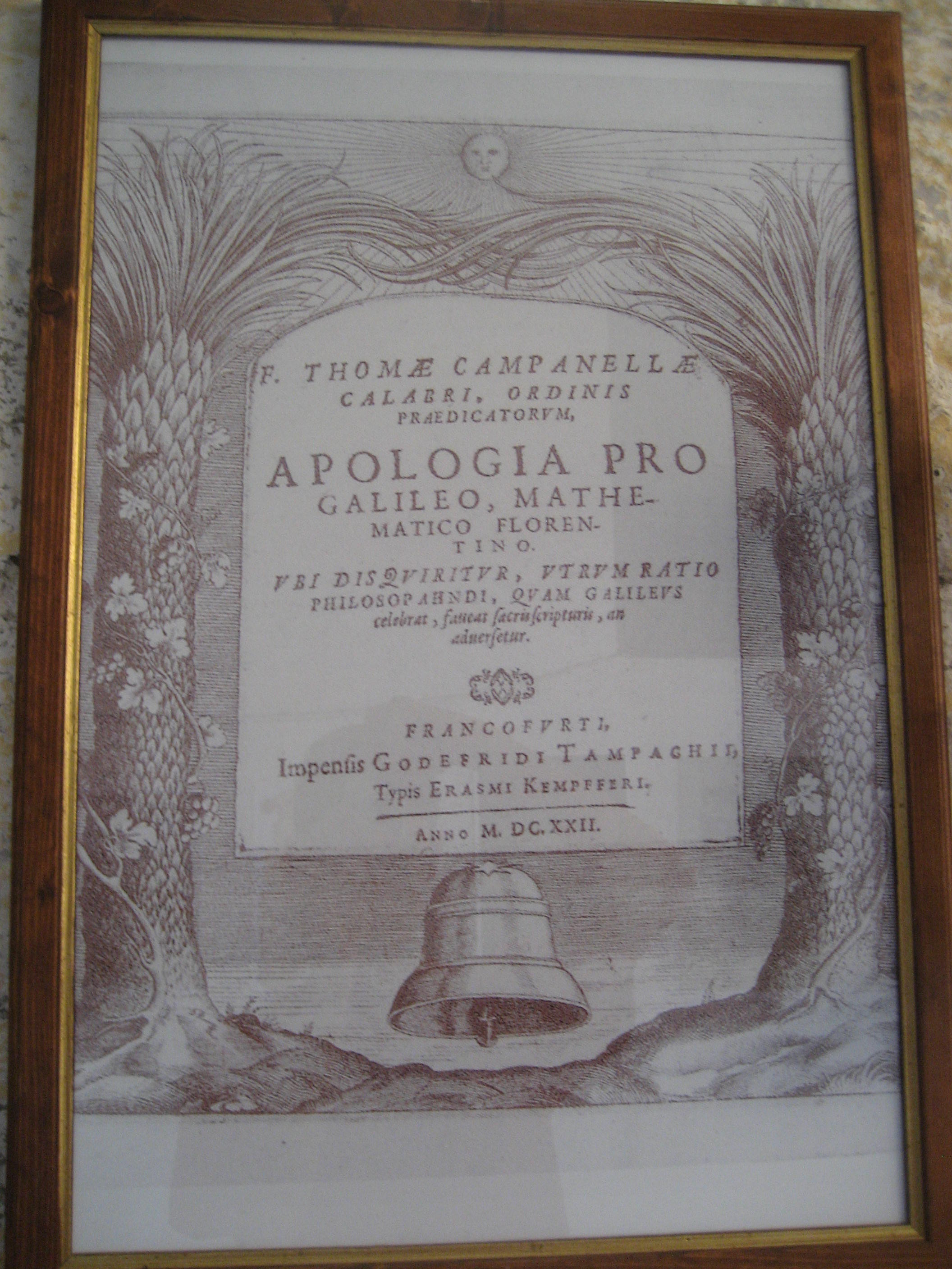 Apologia_pro_galileo